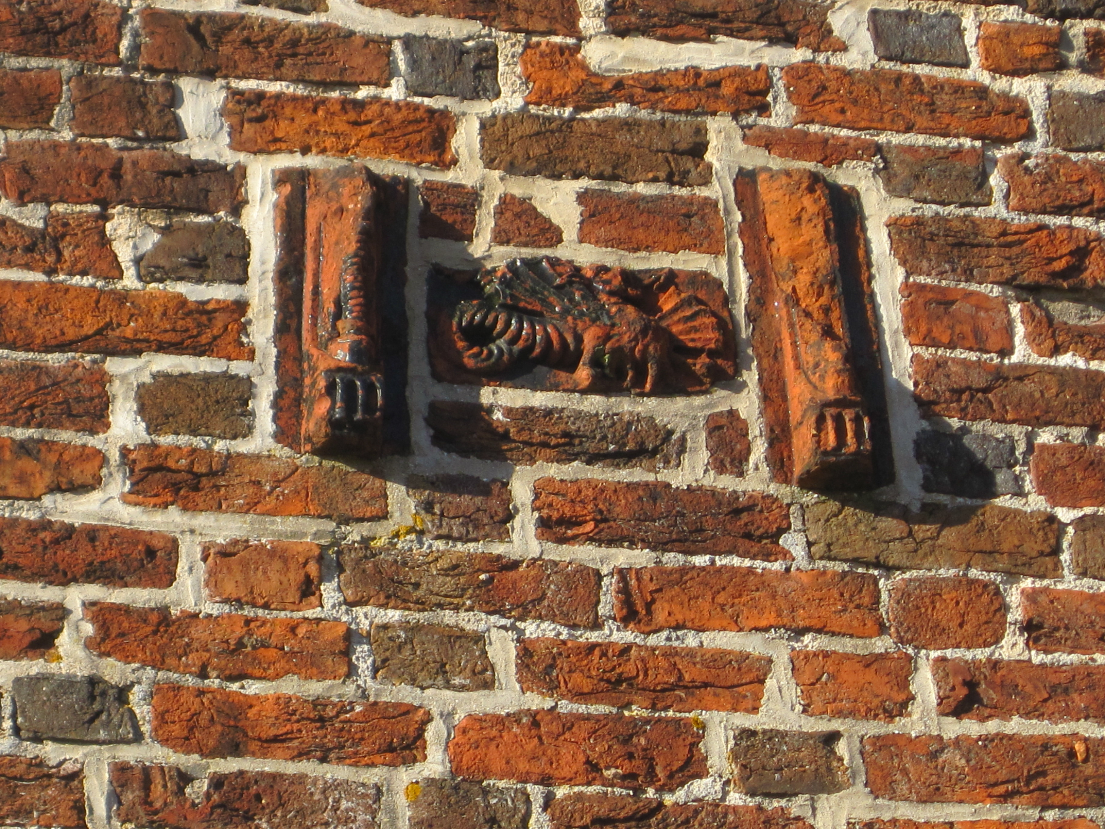 Skorpion-Ziegel der Kirche Diedrichshagen